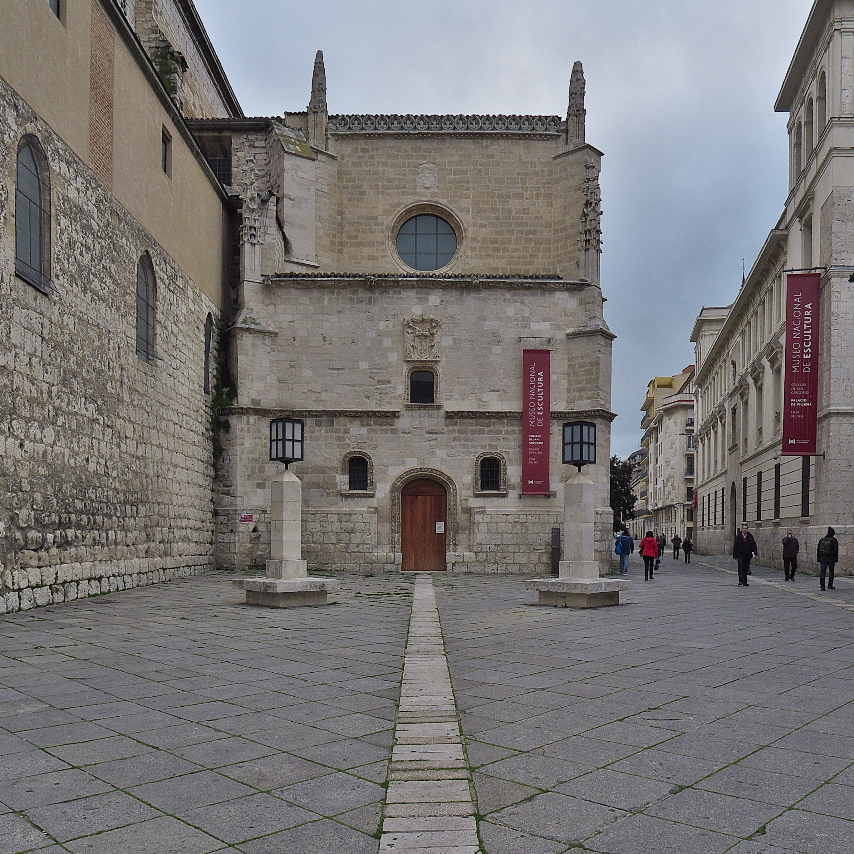 Portada occidental de la capilla funeraria del Colegio de San Gregorio, única puerta exterior.